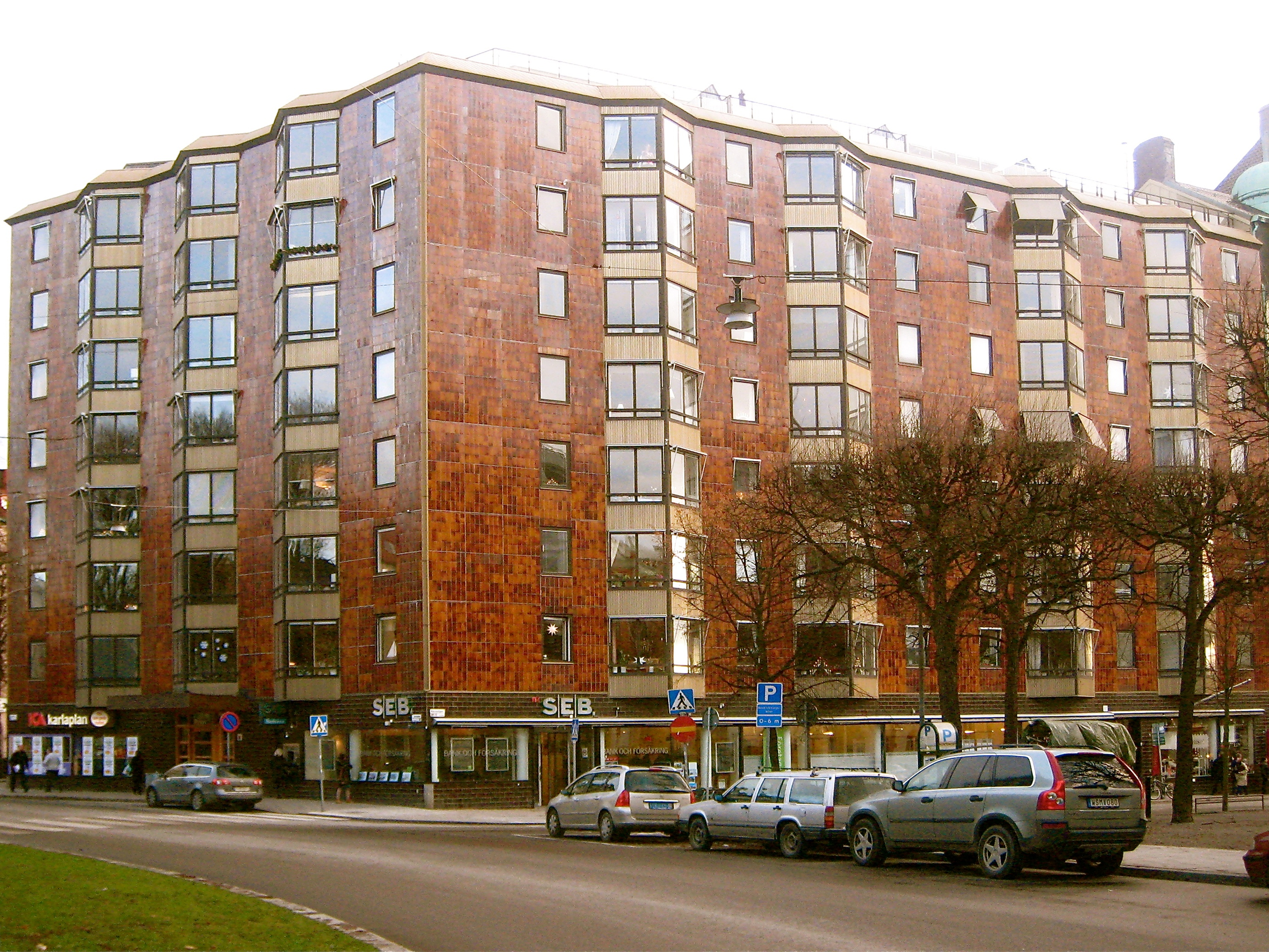 Det nya huset vid se:Karlaplan som ersatte det rivna se:Strindbergshuset, Karlaplan